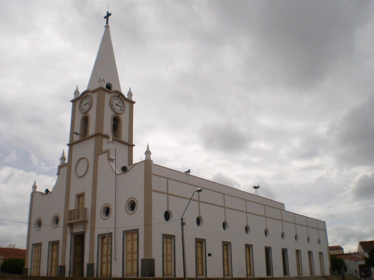 Imagem lateral da Matriz de Jaguaribe/CE